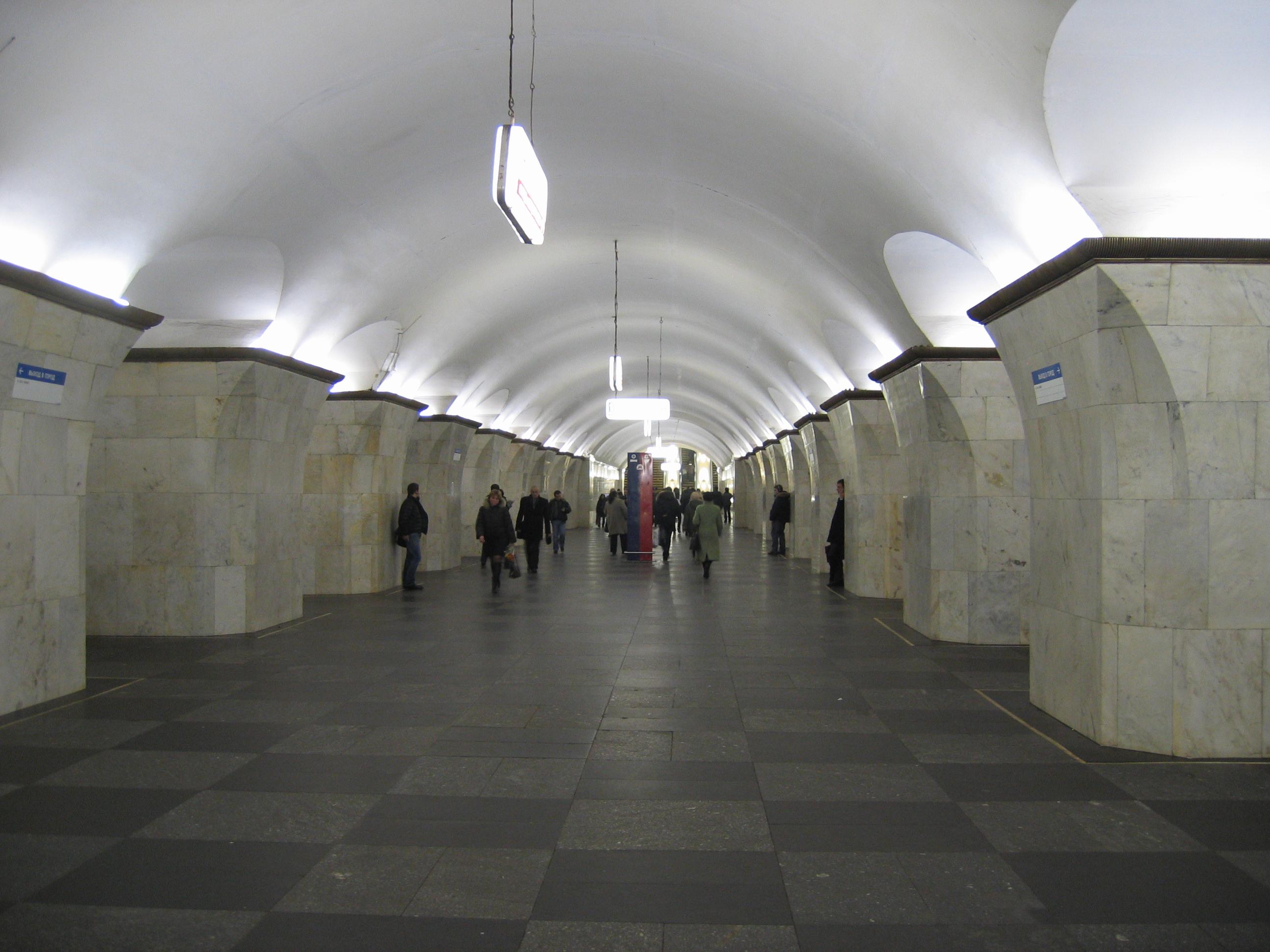 Московский метрополитен. Станция Проспект Мира-радиальная